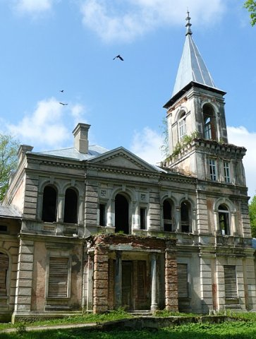 д. Ястрембель, усадьба Котлубаев, 1897 г. Сейчас на территории усадьбы располагается школа-интернат. Фото путешествия по Беларуси.